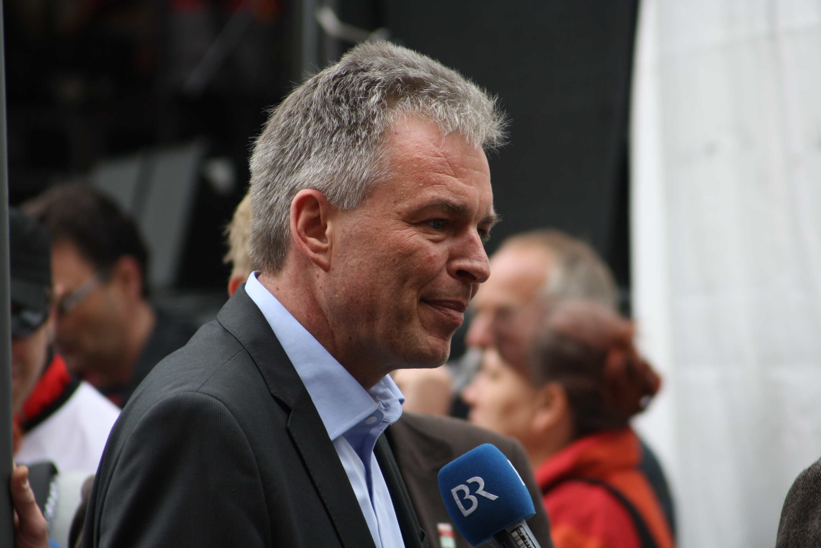 Matthias Jena (* 12. Februar 1961 in München) ist seit 2. März 2010 Vorsitzender des Deutschen Gewerkschaftsbundes (DGB) Bayern. Bei einem Interview am Tag der Arbeit in München am Marienplatz. Interview beim Sender Bayrisches Fernsehen.